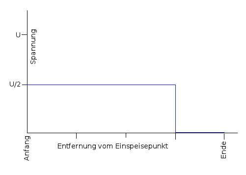 Spannungsverlauf längs eines Kabels, kurz bevor eine angelegte Gleichspannung das Kabelende erreicht. Ebenfalls korrekt: Spannungsverlauf längs eines Kabels, kurz nachdem eine angelegte Gleichspannung am Kurzgeschlossenen Kabelende reflektiert wurde. Die Sprungstelle läuft zum Kabelanfang zurück.